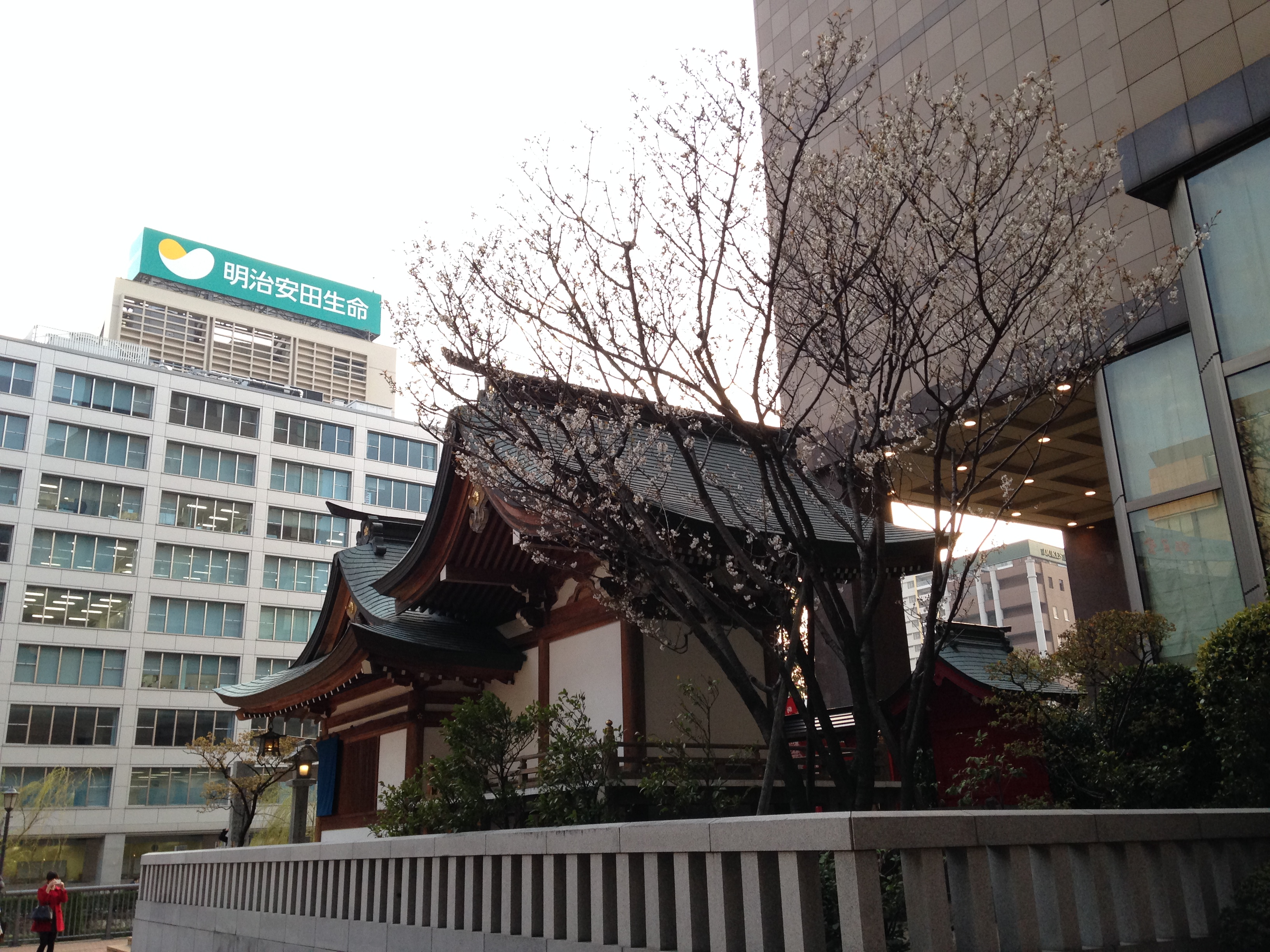 北側より見る鏡天満宮